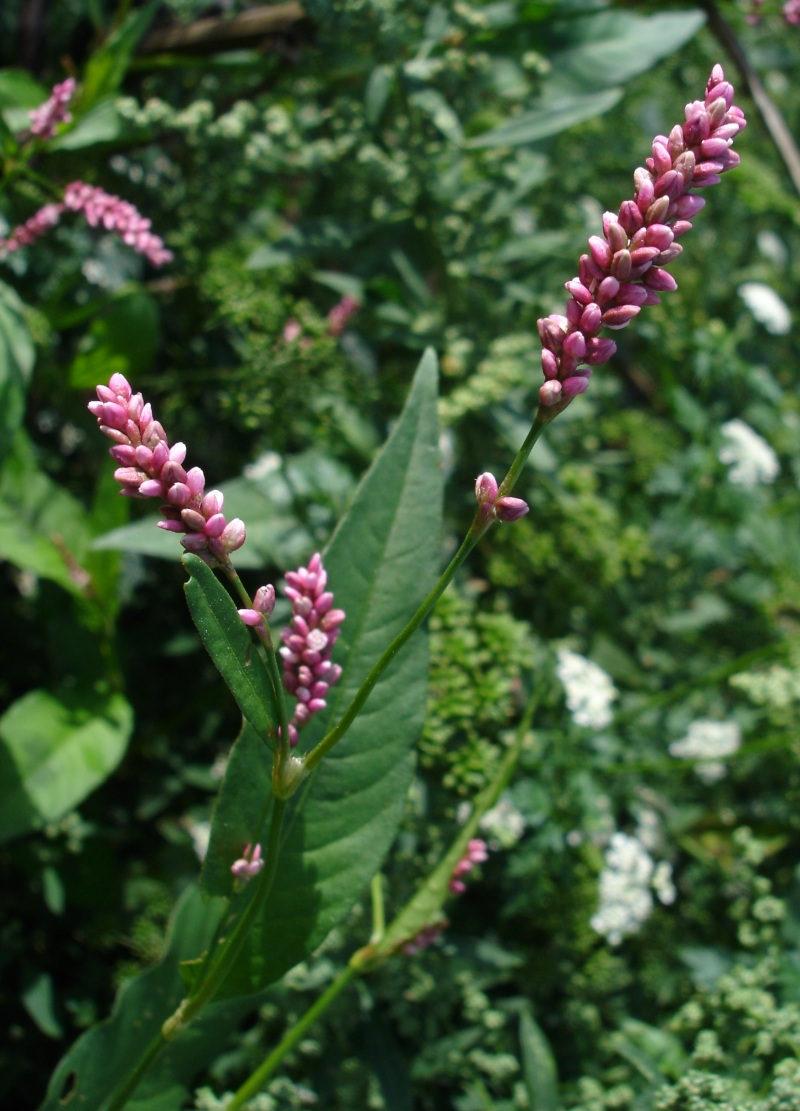 Polygonum persicaria, photo prise à Mastaing